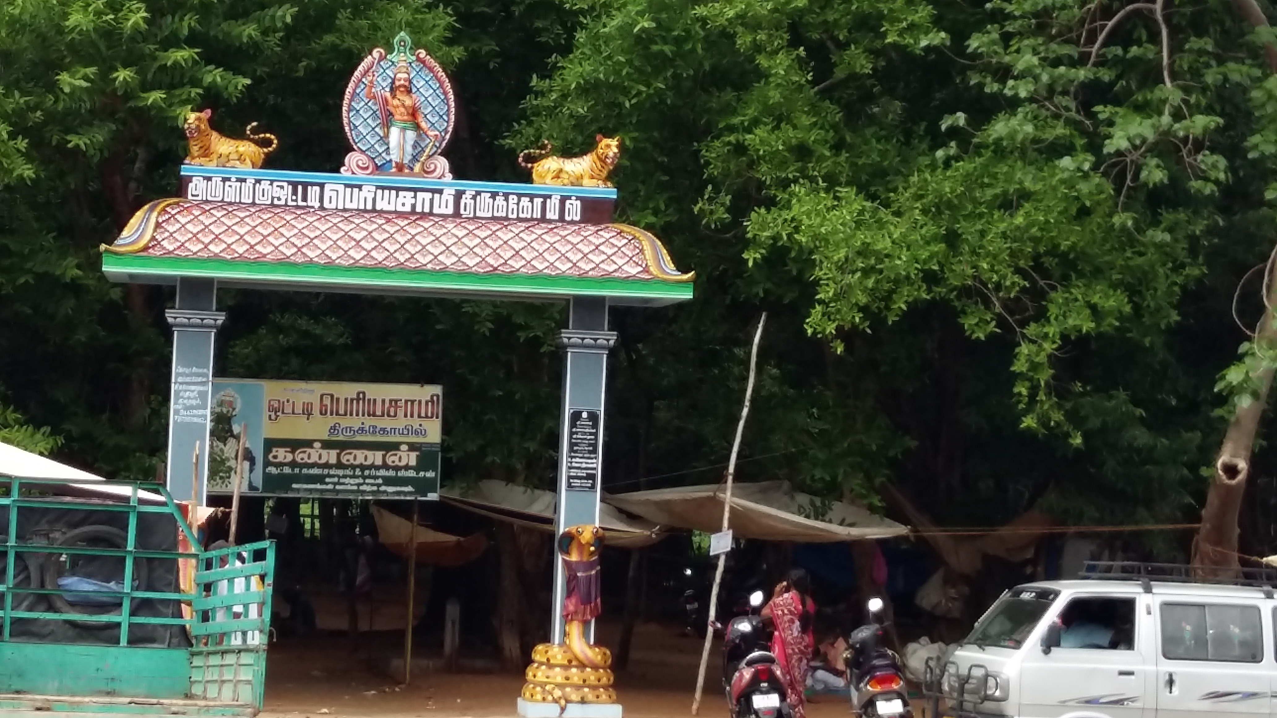 பெரியசாமி கோவிலின் நுழைவு வாசல் இது ஒட்டடி பெரியசாமி கோவில் என அதிகாரபூர்வமாக அறிவிக்கடுகிறது. இது நாமக்கல் பக்கமுள்ள முத்துகாபட்டிக்கு அருகில் புதுகோம்பை என்ற இடத்தில் உள்ளது.